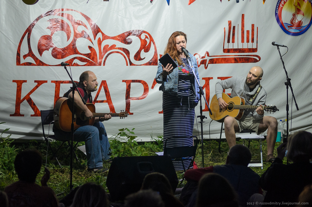 Ирина Сурина, Константин Тарабрин, Павел Дугин. 44-й фестиваль авторской песни им. Валерия Грушина. Мастрюковские озера, Самарская область, Россия